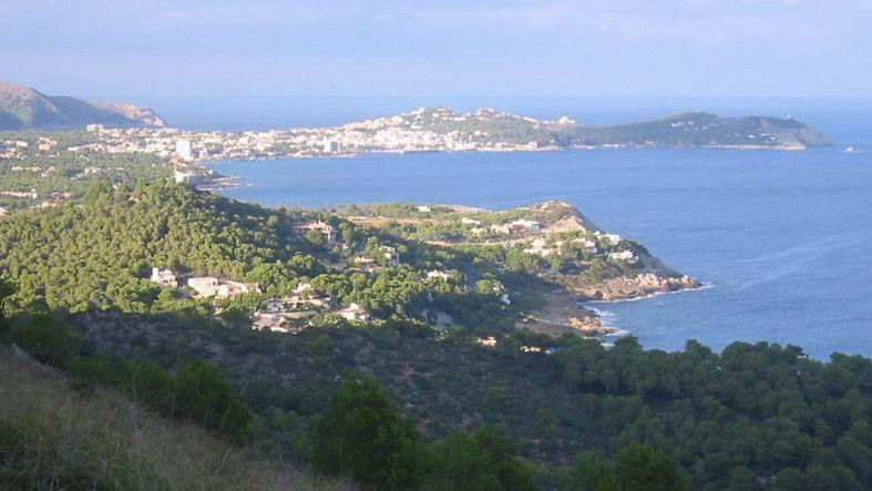 Die Landzunge von Cala Ratjada in nördlicher Richtung fotografiert. Eigenes Bild.